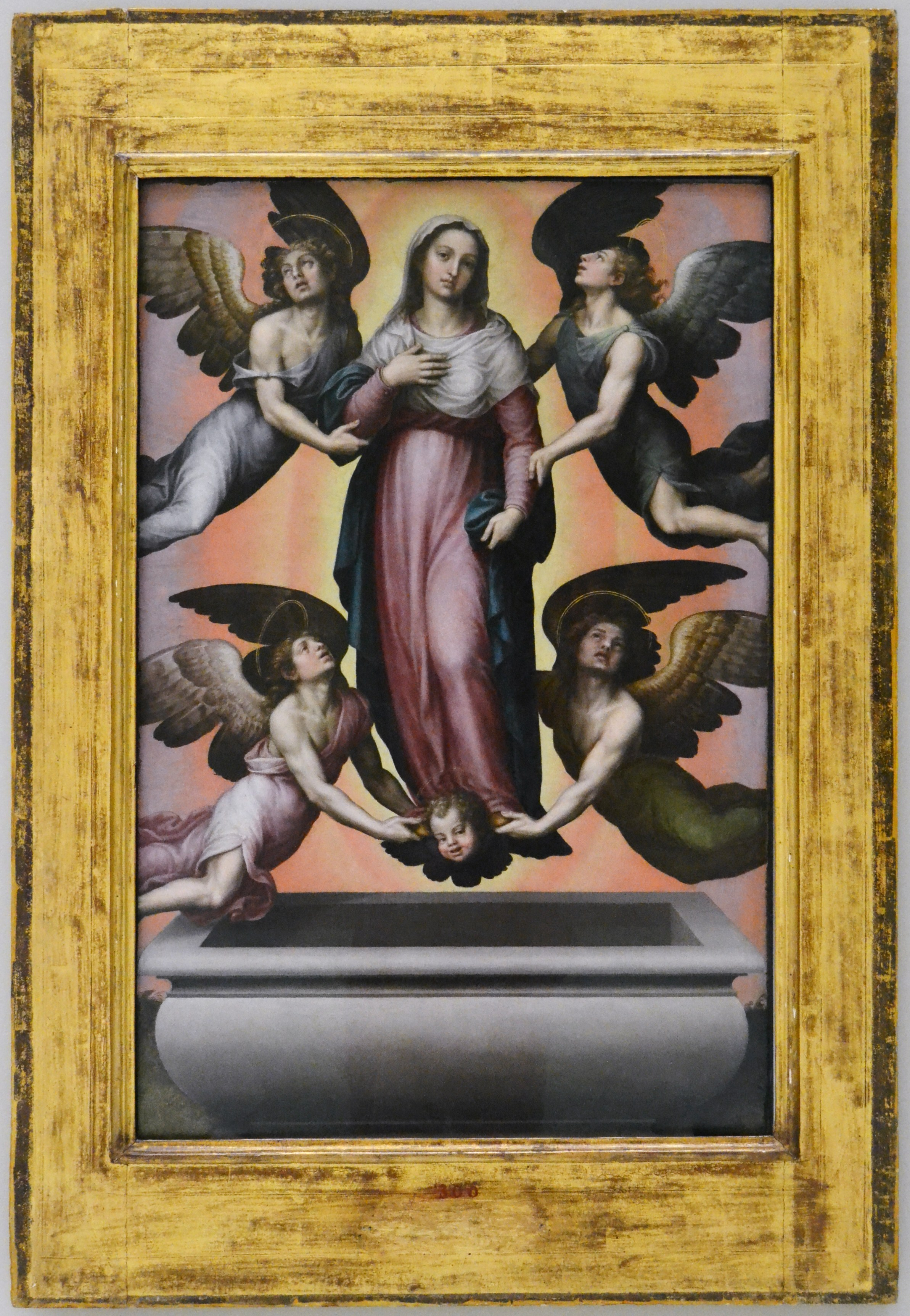 La obra representa la asunción de la Virgen María en cuerpo y alma a los cielos.